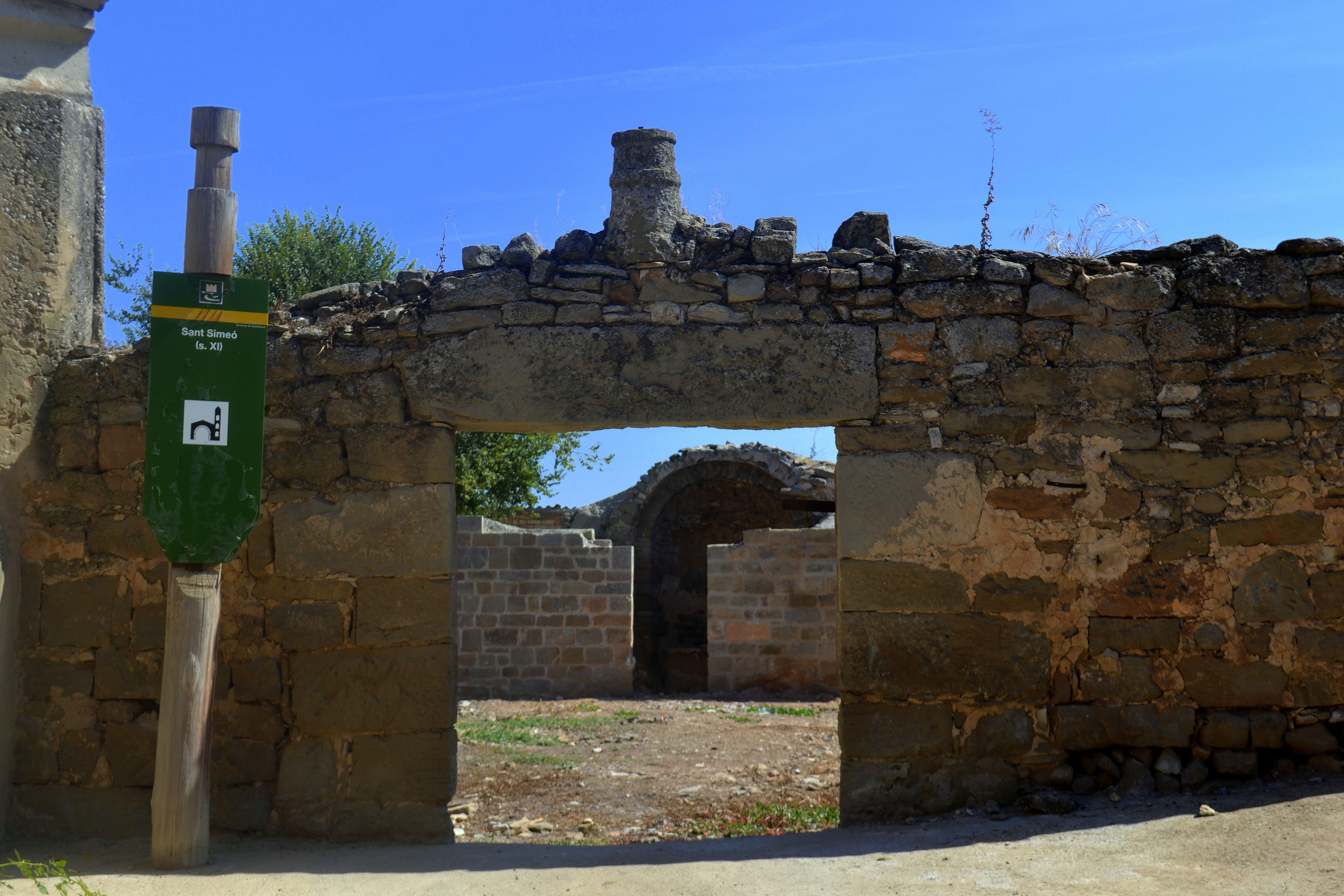 Ermita de Sant Simeó (Massoteres)